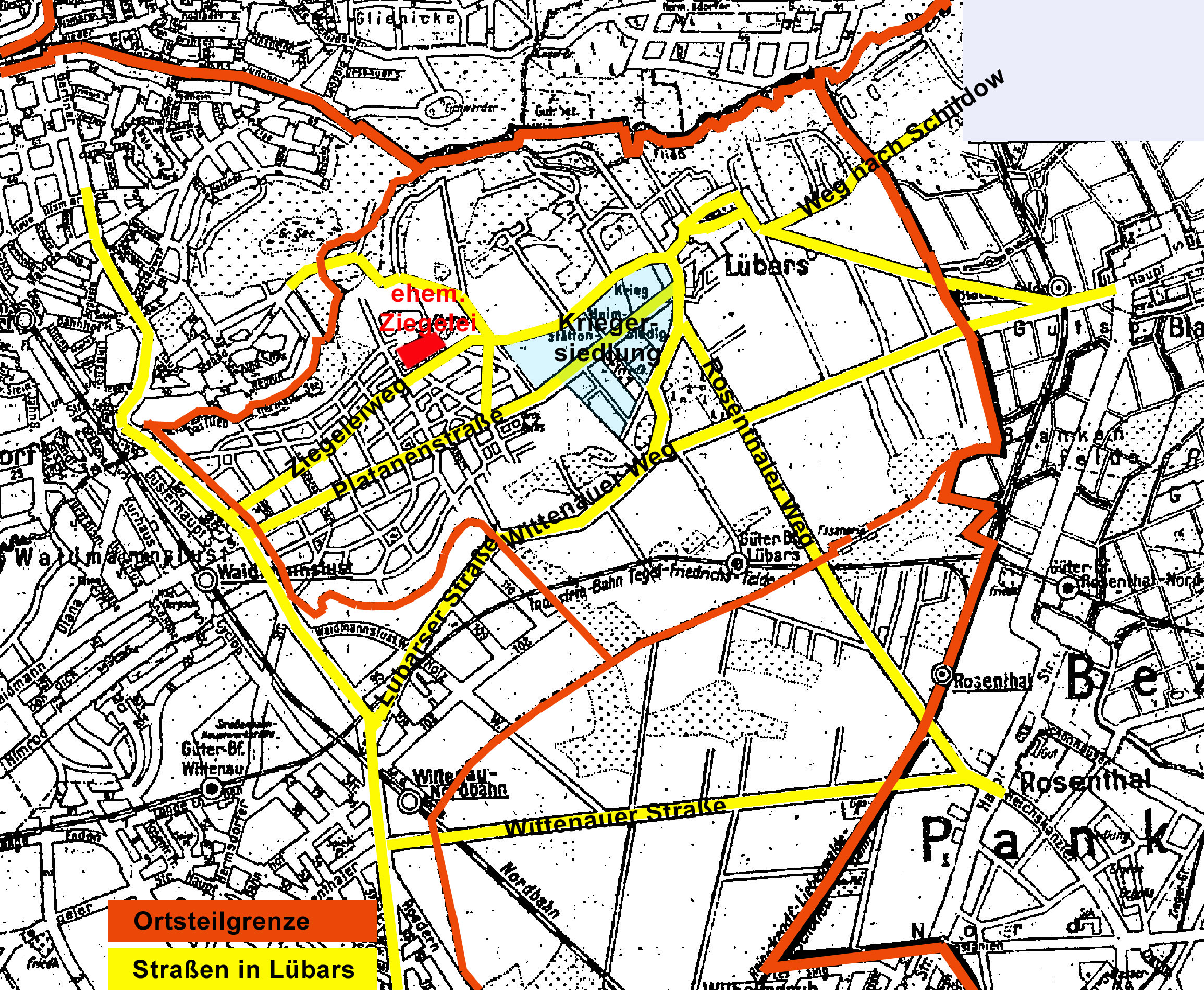 Das Straßensystem des heutigen Ortsteils Berlin-Lübars nach der Darstellung auf der Beikarte aus dem Berliner Adressbuch von 1922, nach Eingliederung der Gemeinde Lübars zu Groß-Berlin im Verwaltungsakt von 1920.